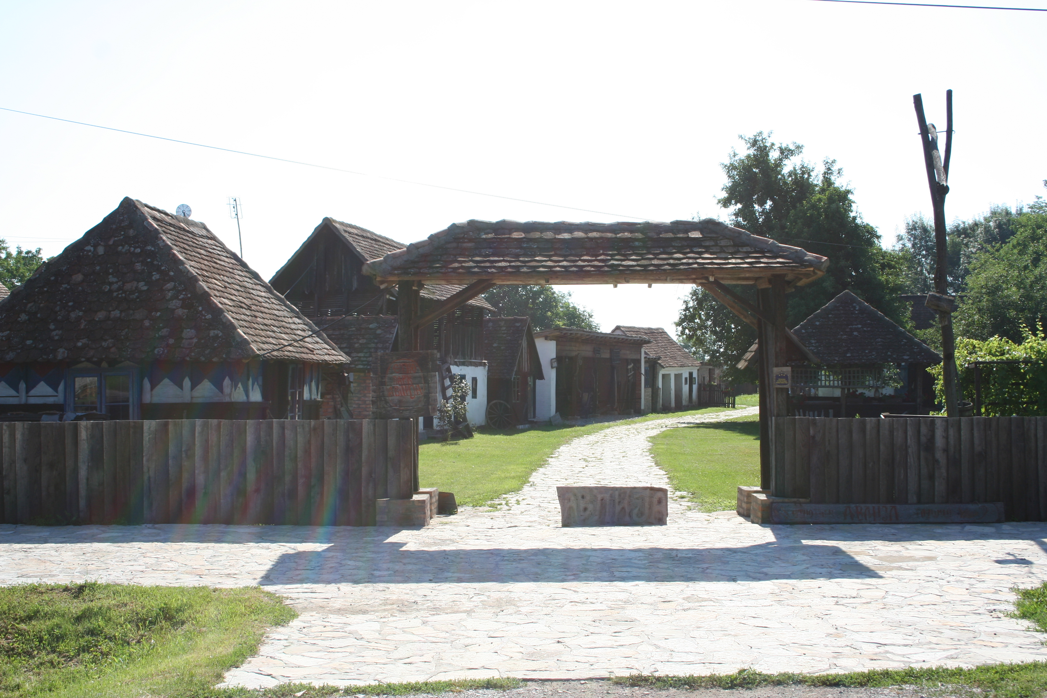 Etno park Avlija, Glušci